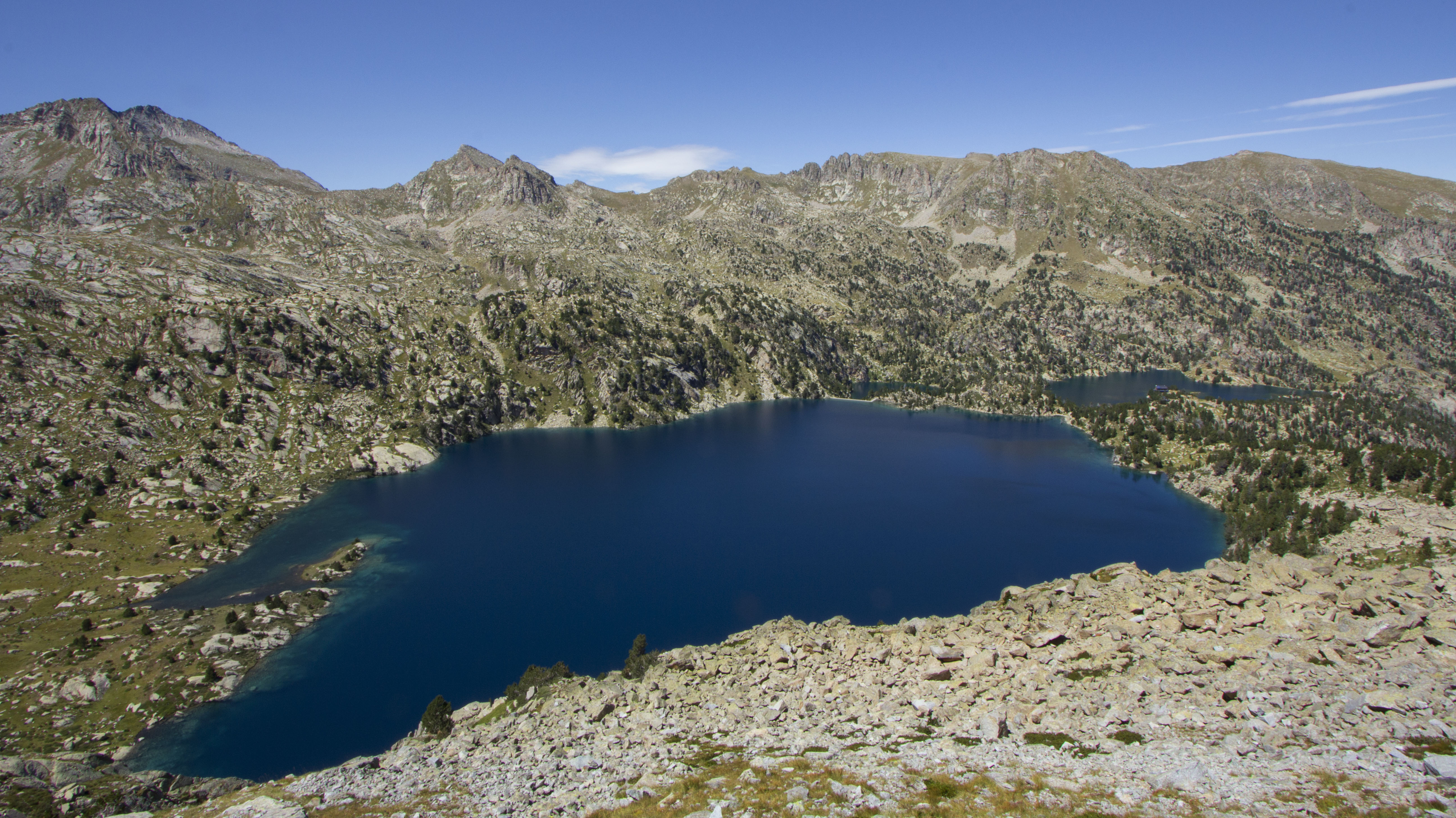 Estanys Negre i Tort de Peguera (Pallars Sobirà)